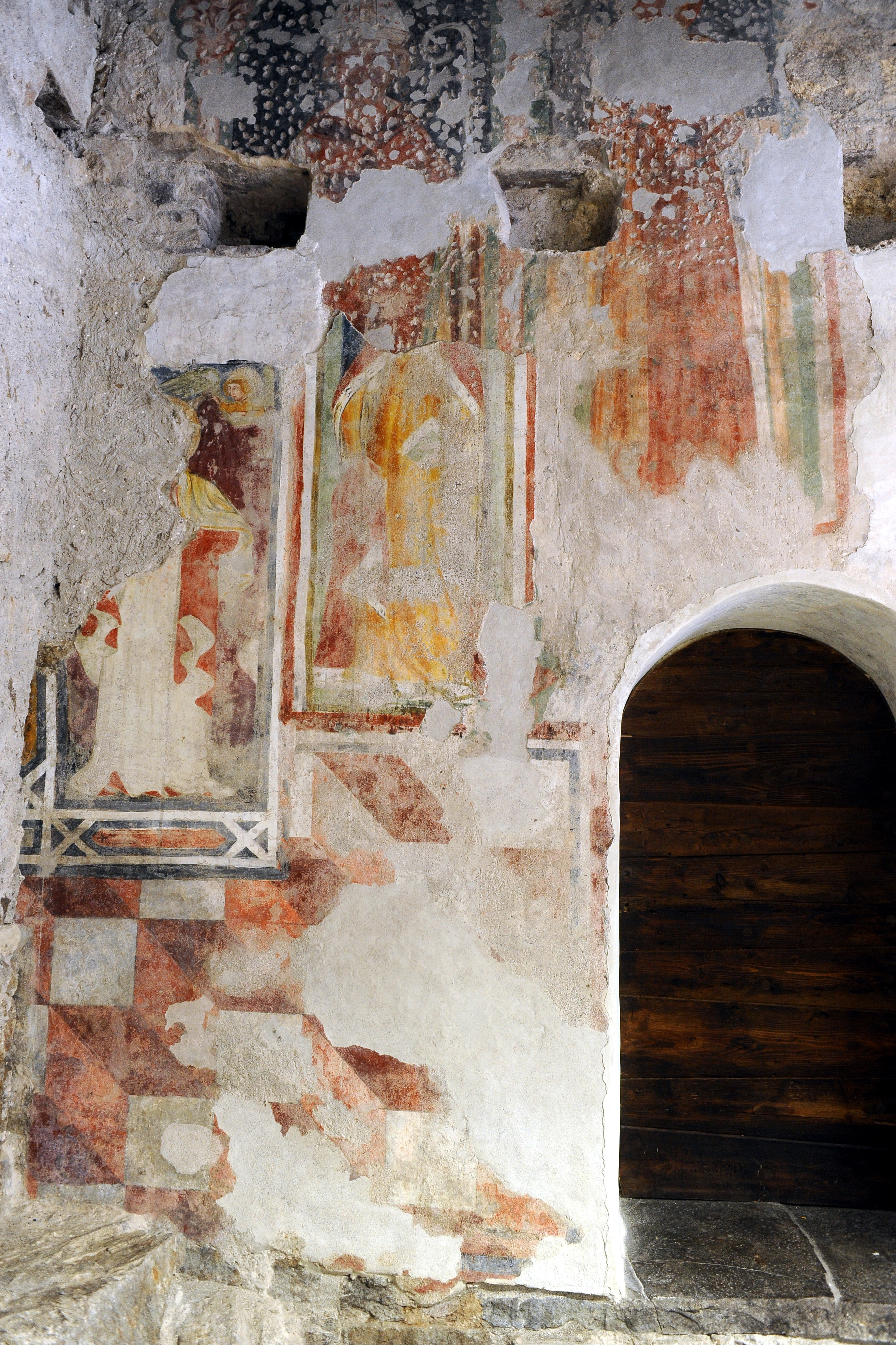 Affresco della vecchia chiesa di San Biagio (Lisignago), oggi visibile all'interno di una sala comunale sottostante alla nuova chiesa.